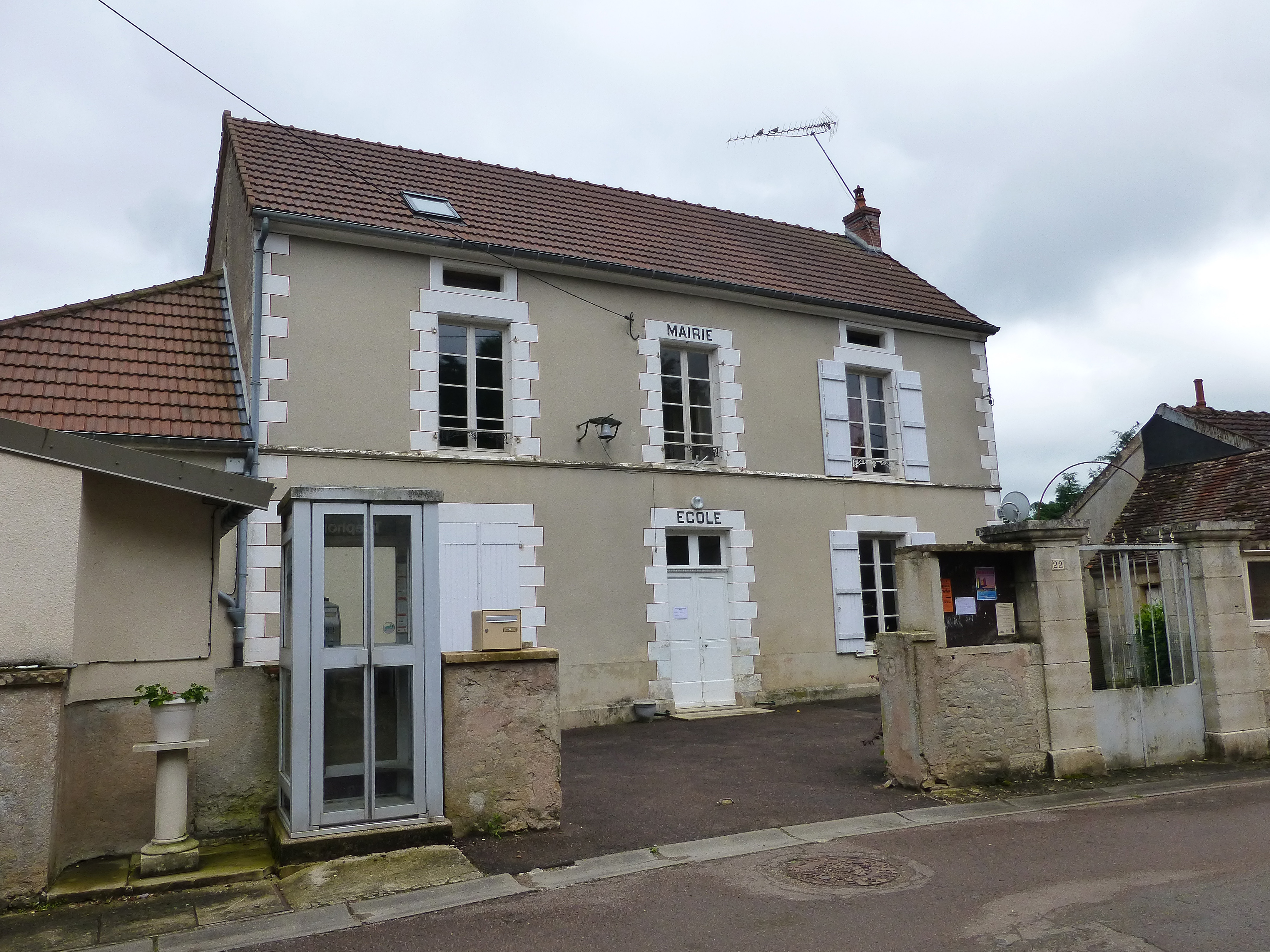 Mairie-école de Talcy (Yonne)